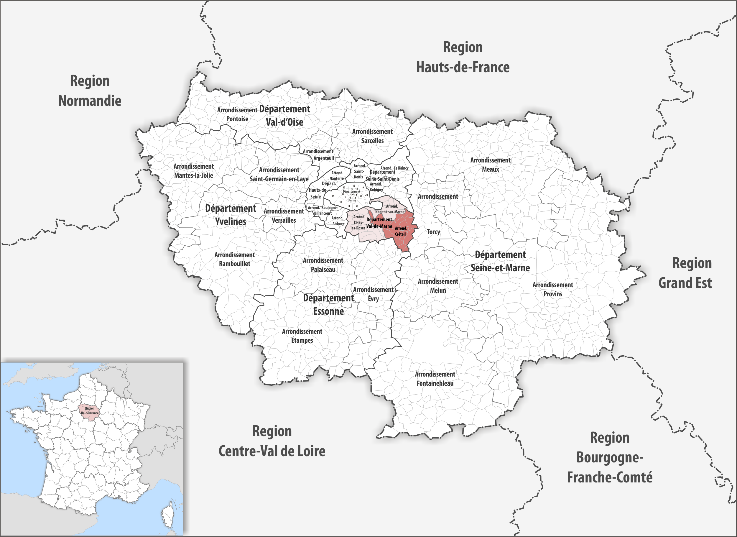 Lage des Arrondissements Créteil